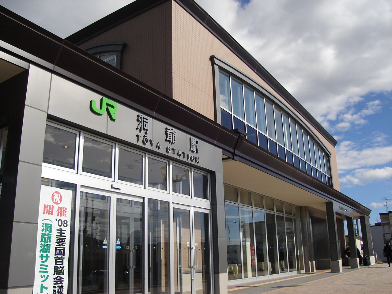 Toya Station, JR Hokkaido